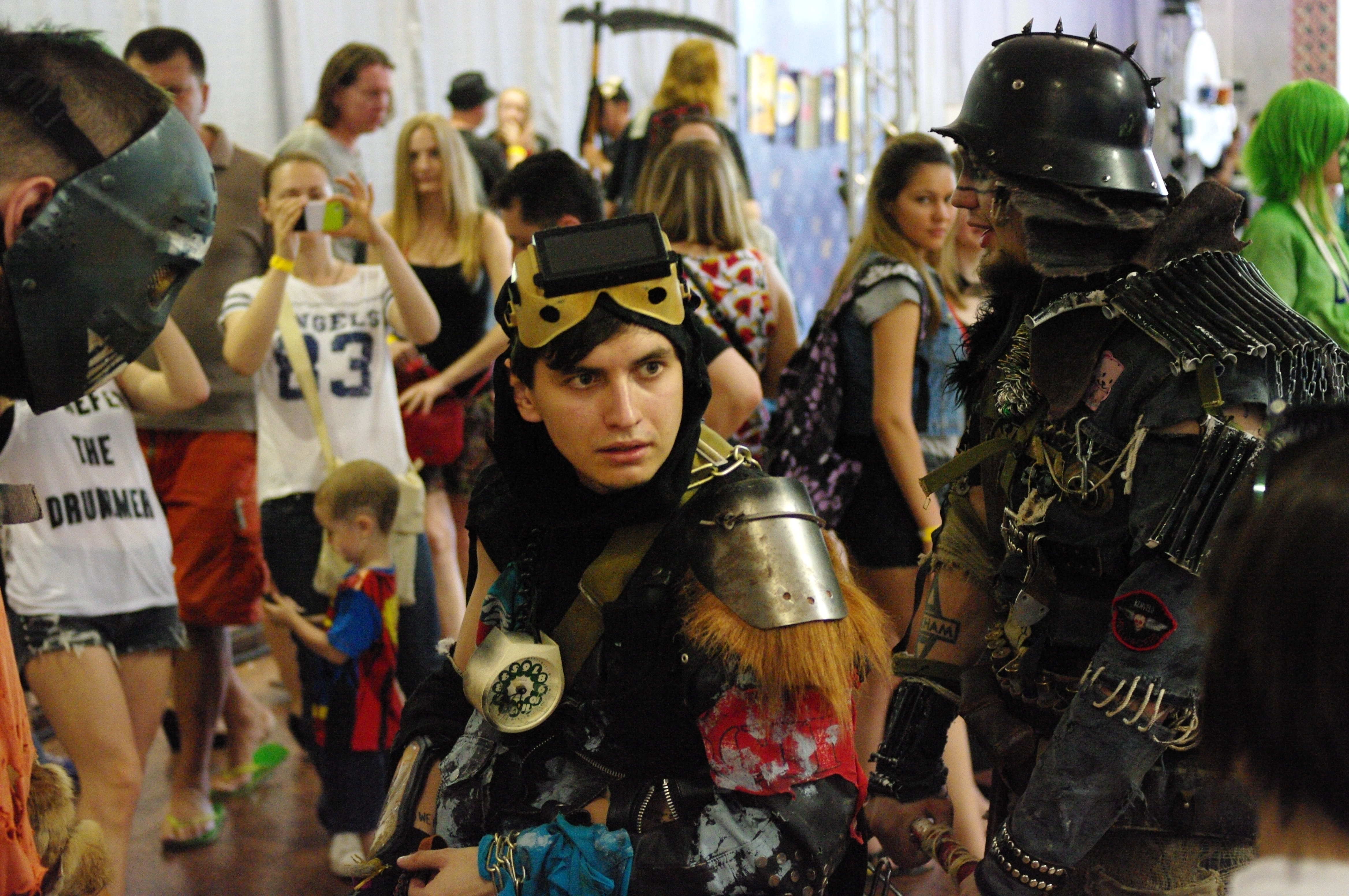 «Київ Комік Кон» 7 червня 2015 (Київ)